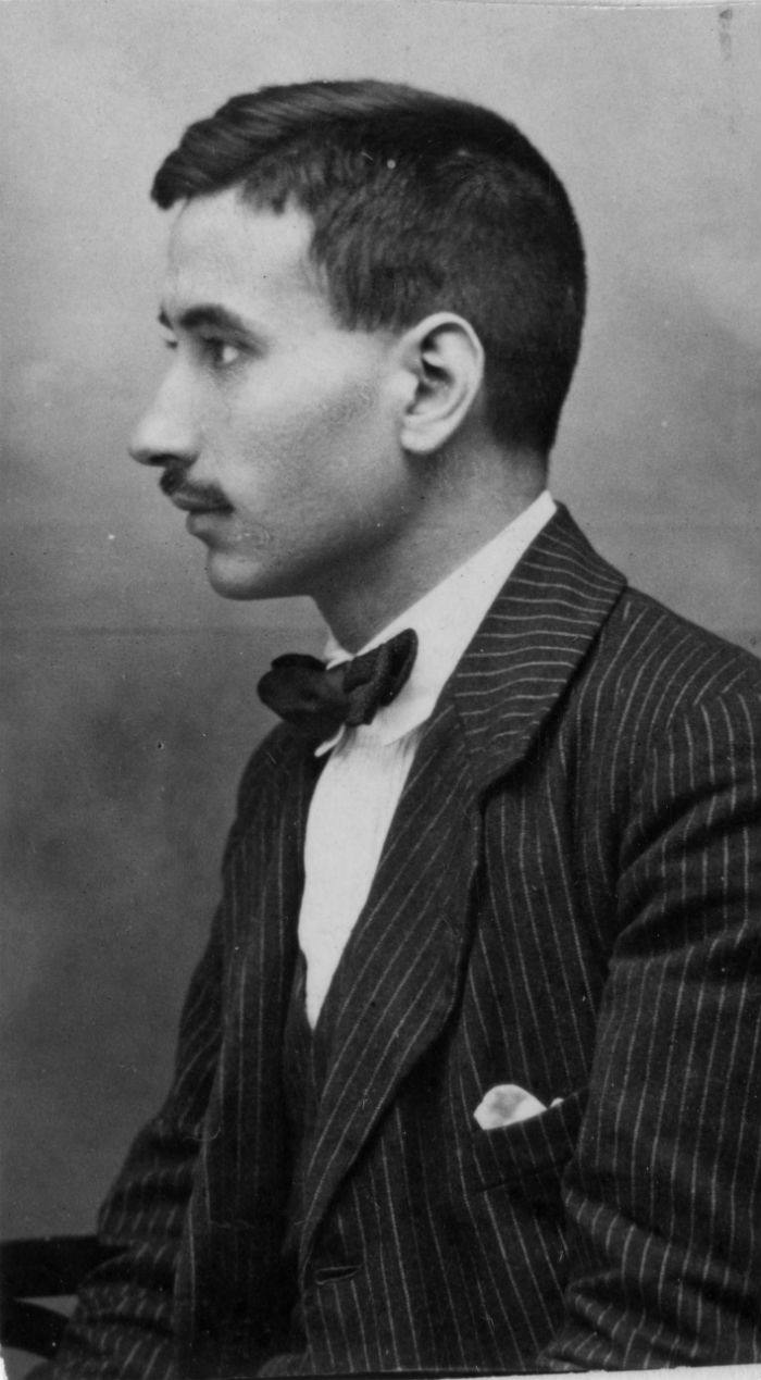 Tomás Batuecas, en 1921, durante a realización da súa tese de doutoramento en Xenebra, primeiro catedrático de Química Física da Universidade de Santiago.